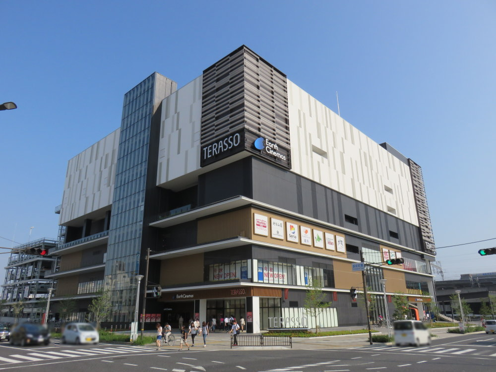 兵庫県姫路市にある商業施設「テラッソ姫路」。北西面。